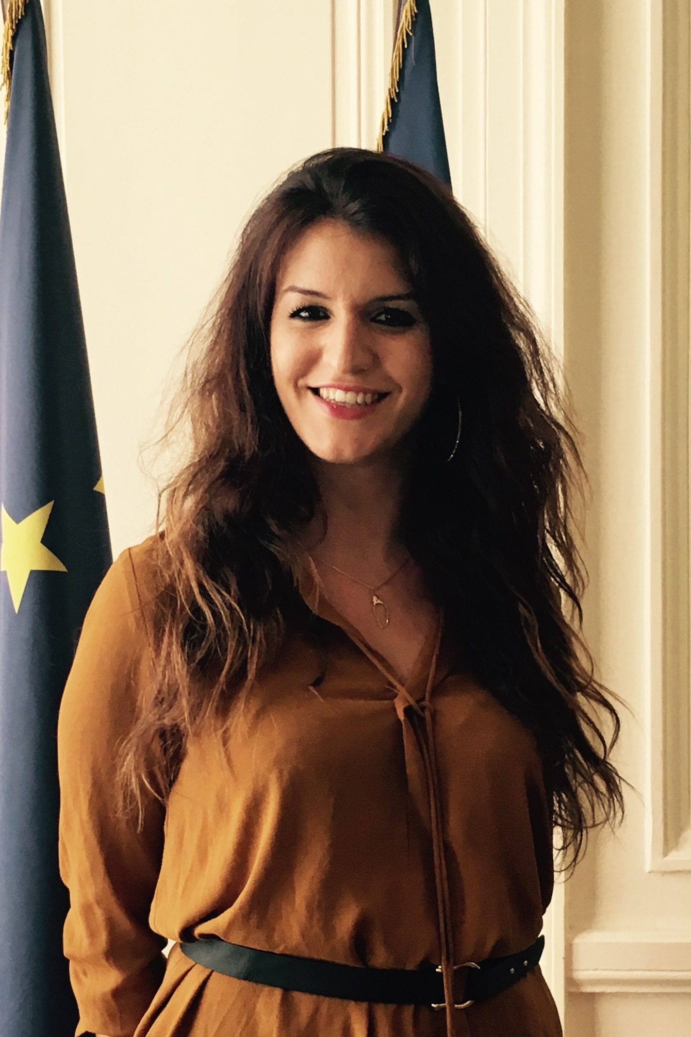 Marlène Schiappa, secrétaire d'Etat auprès du Premier ministre, chargée de l'égalité entre les femmes et les hommes